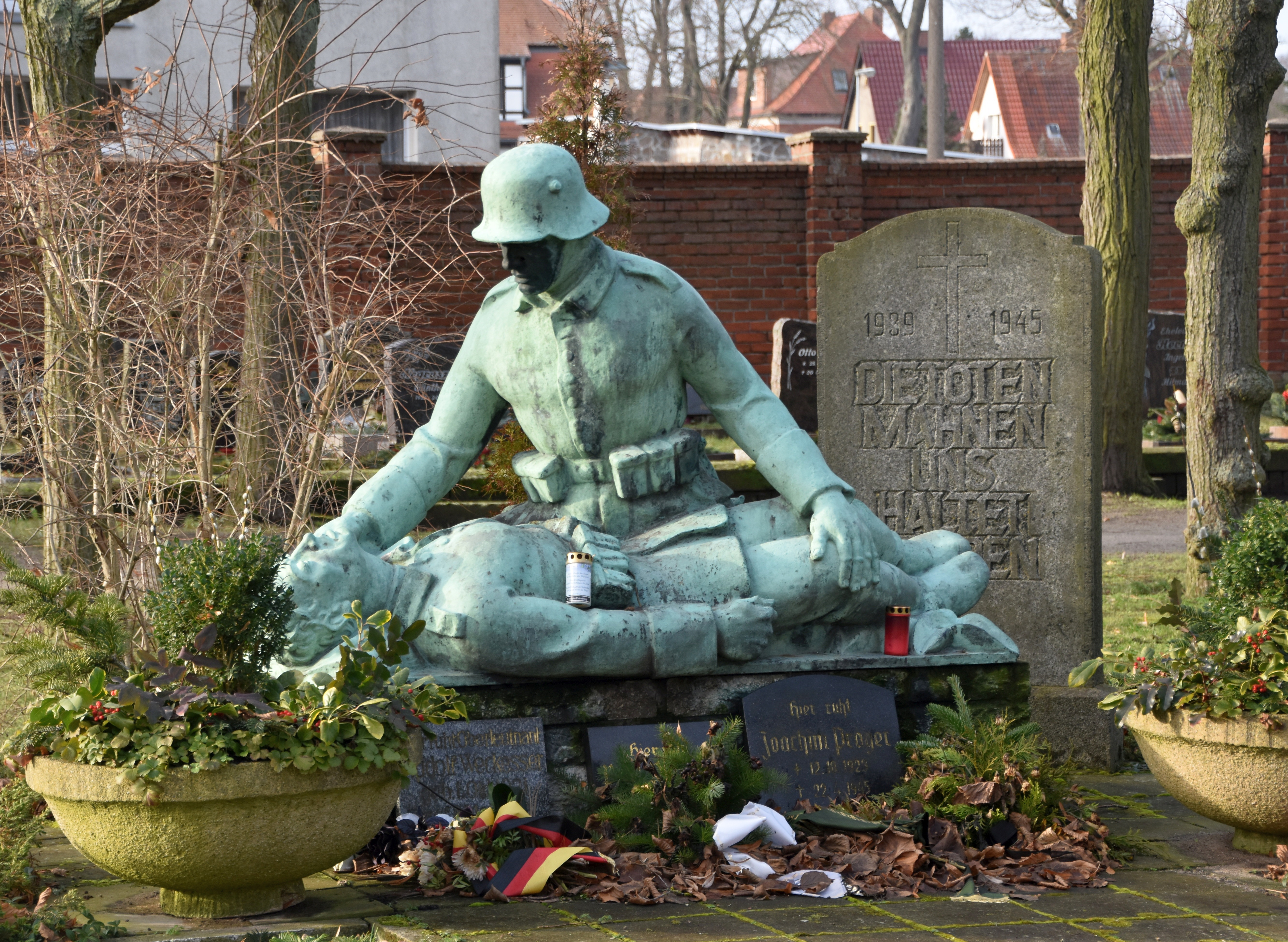 Kriegerdenkmal von 1931 für die Gefallenen des Ersten Weltkrieges auf dem Friedhof Genthin